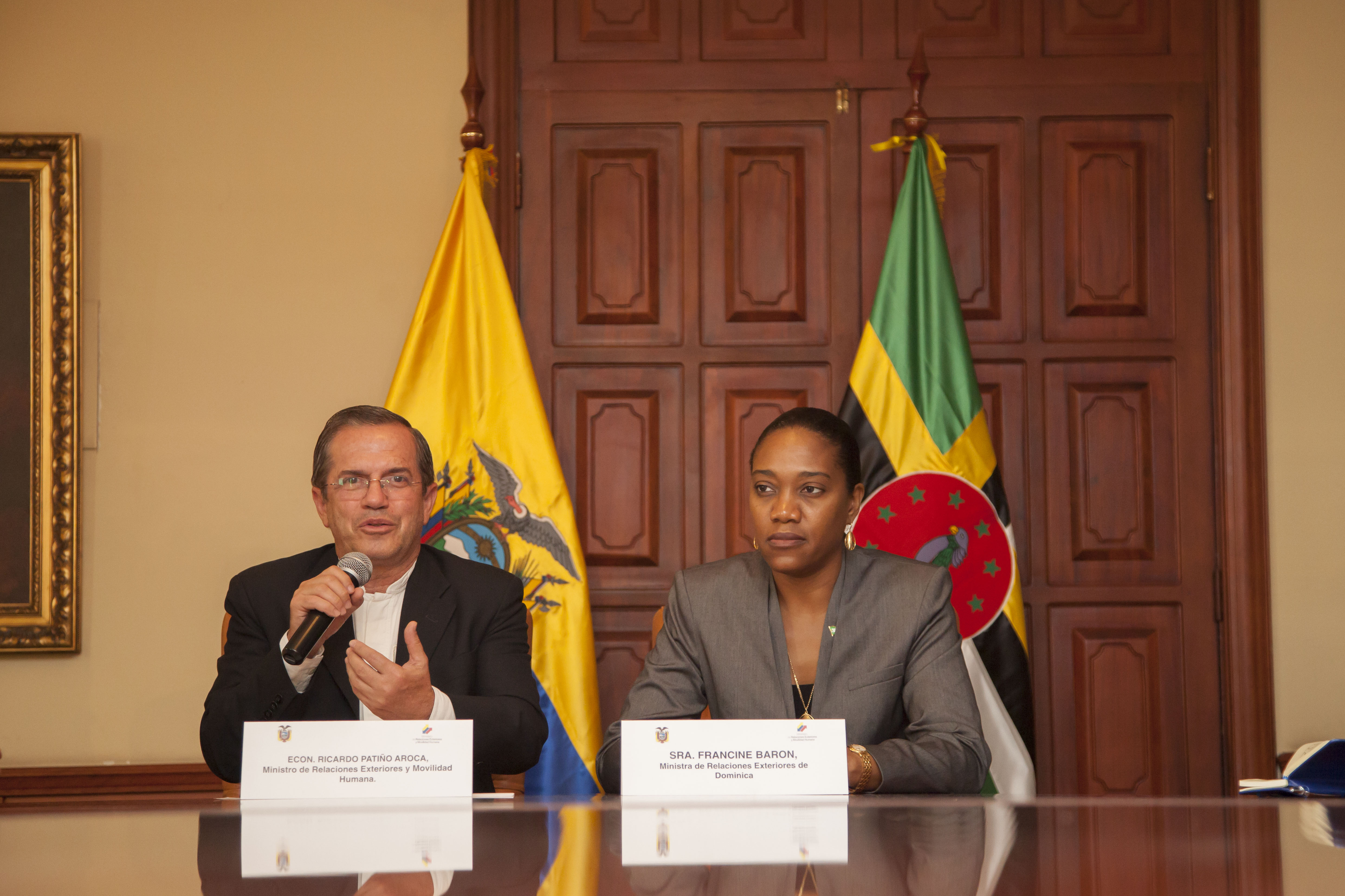 Quito, Ecuador. 13 de abril de 2015. Rueda de prensa conjunta entre: Francine Baron, Canciller de Dominica y Ricardo Patiño Canciller del Ecuador. Carlos Pozo Albán / Cancillería Ecuador